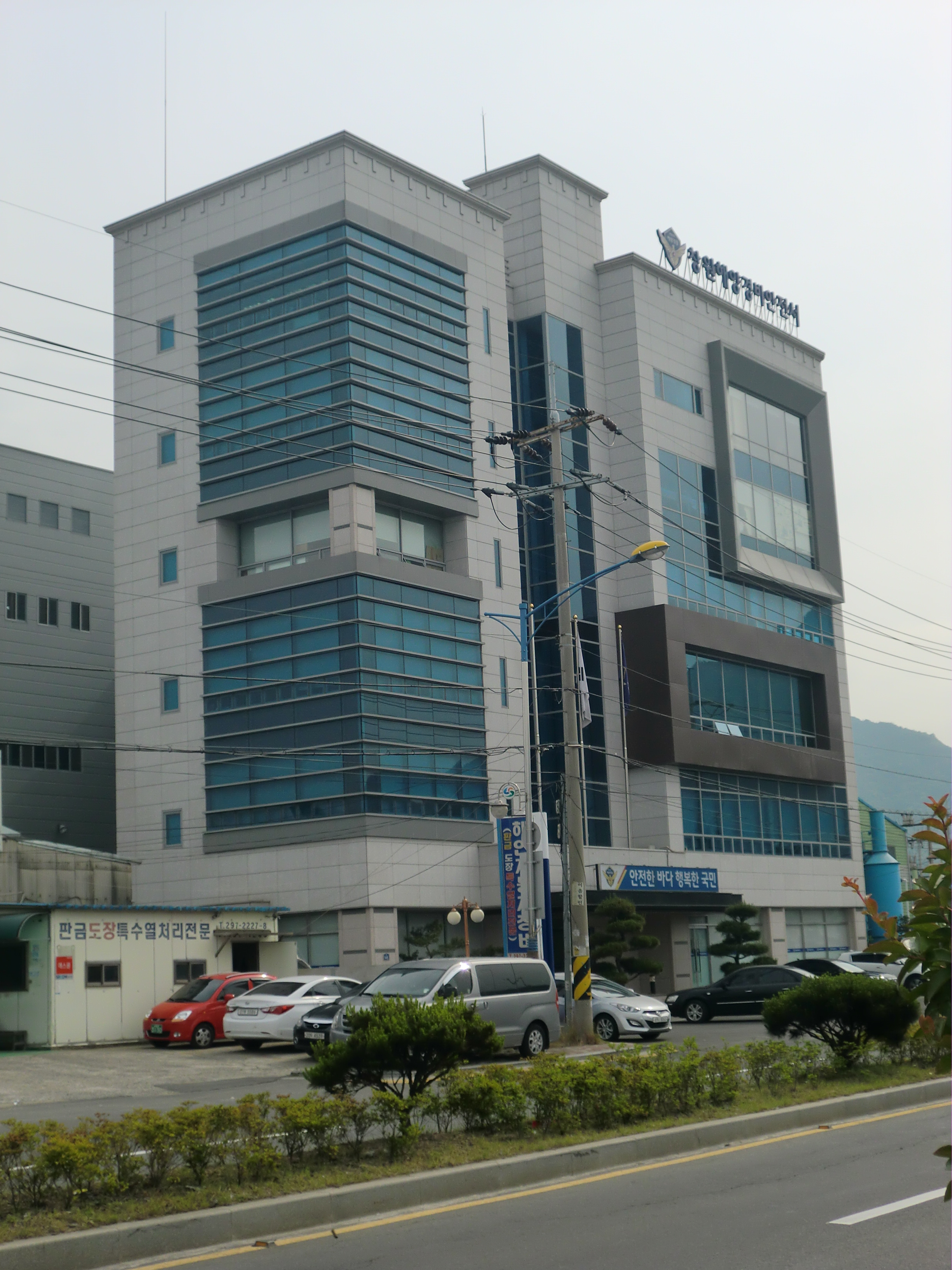 경상남도 창원시에 있는 창원해양경비안전서